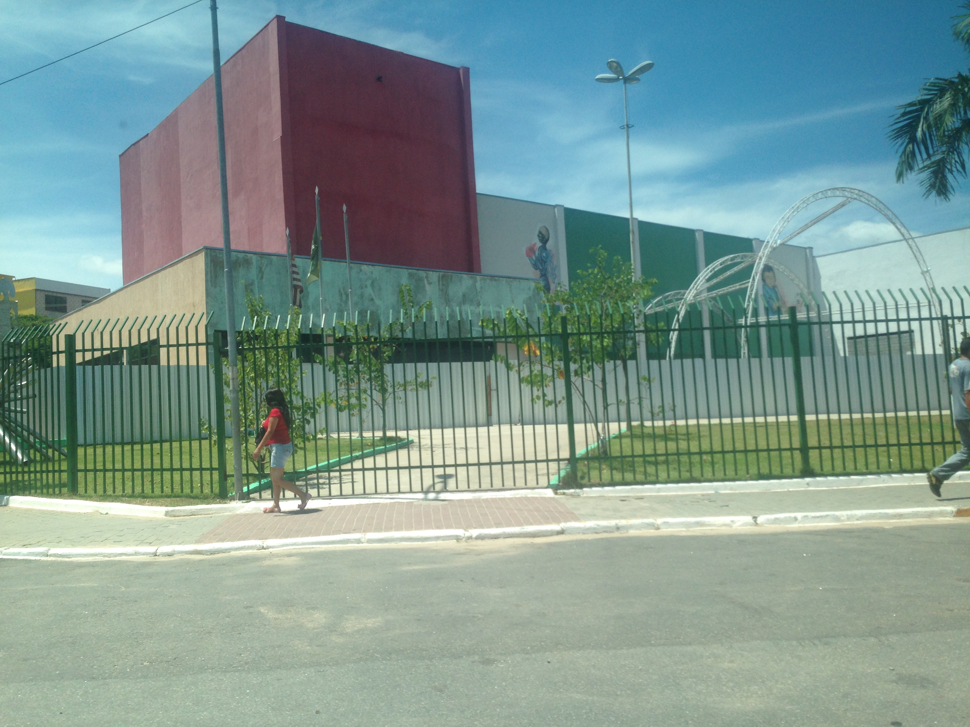 Autoria de José Spadoni Barros, respeite o autor em caso de cópias.